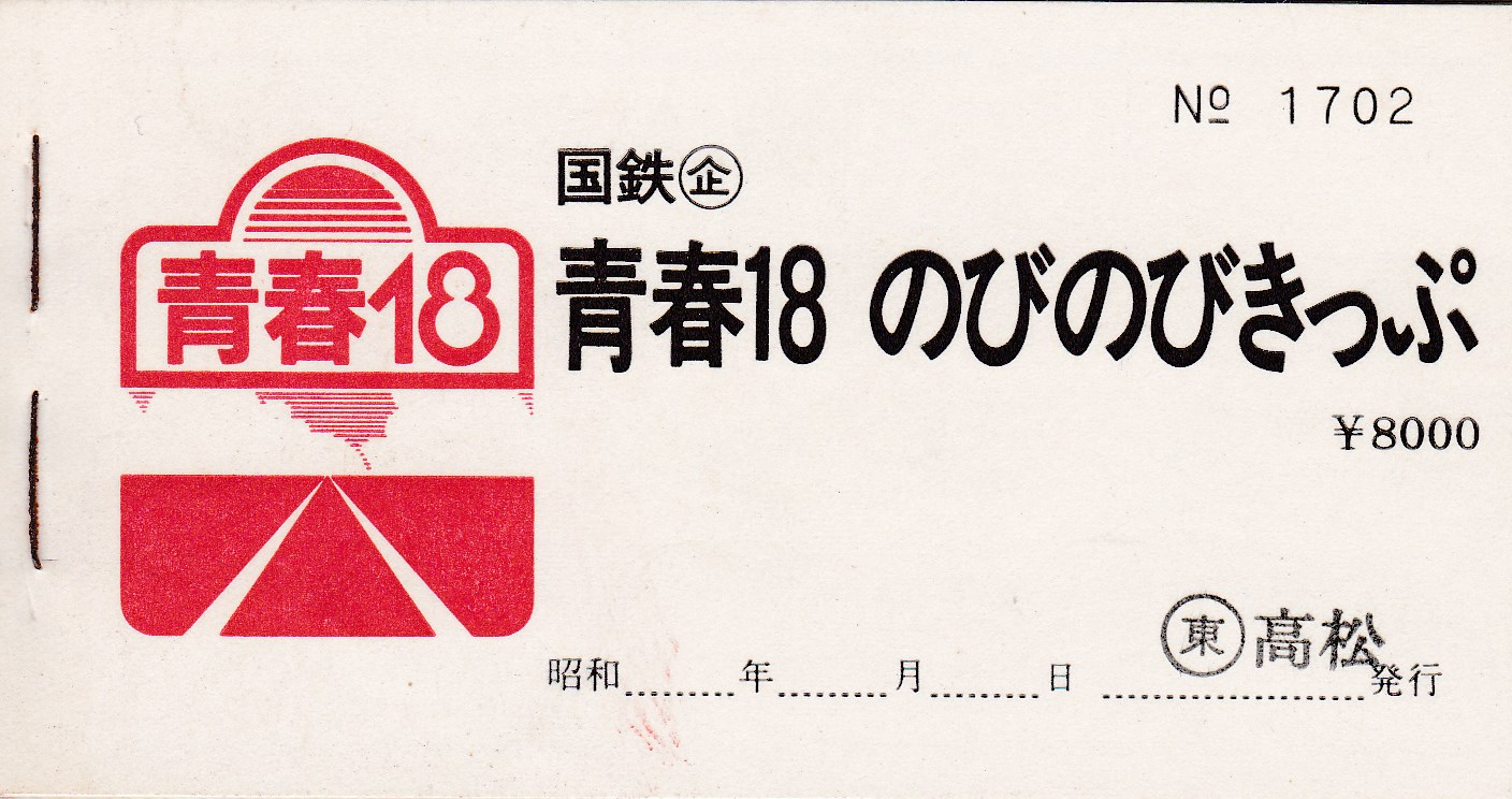 発売当初の「青春18のびのびきっぷ」表紙